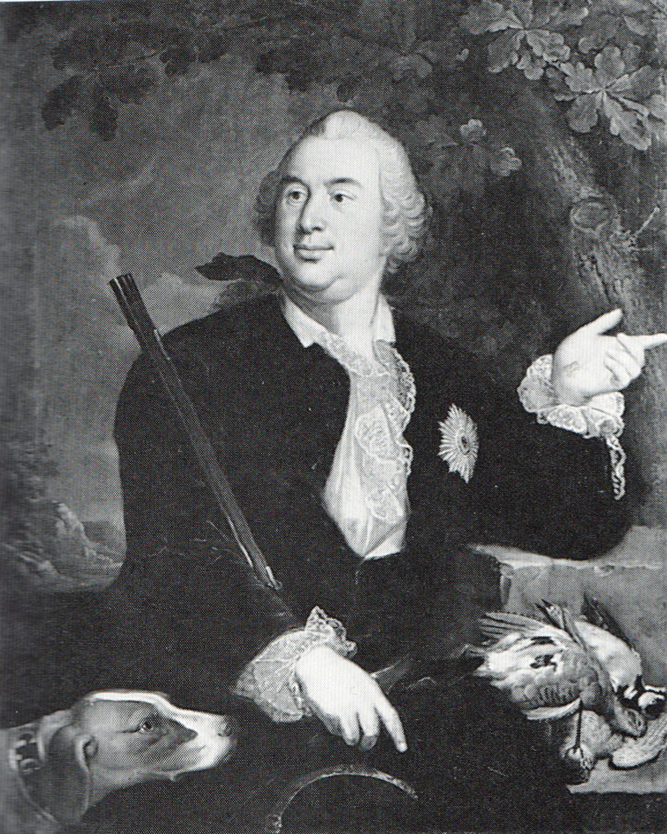 Ölgemälde von Gustav Adolf Graf von Gotter als Jäger.